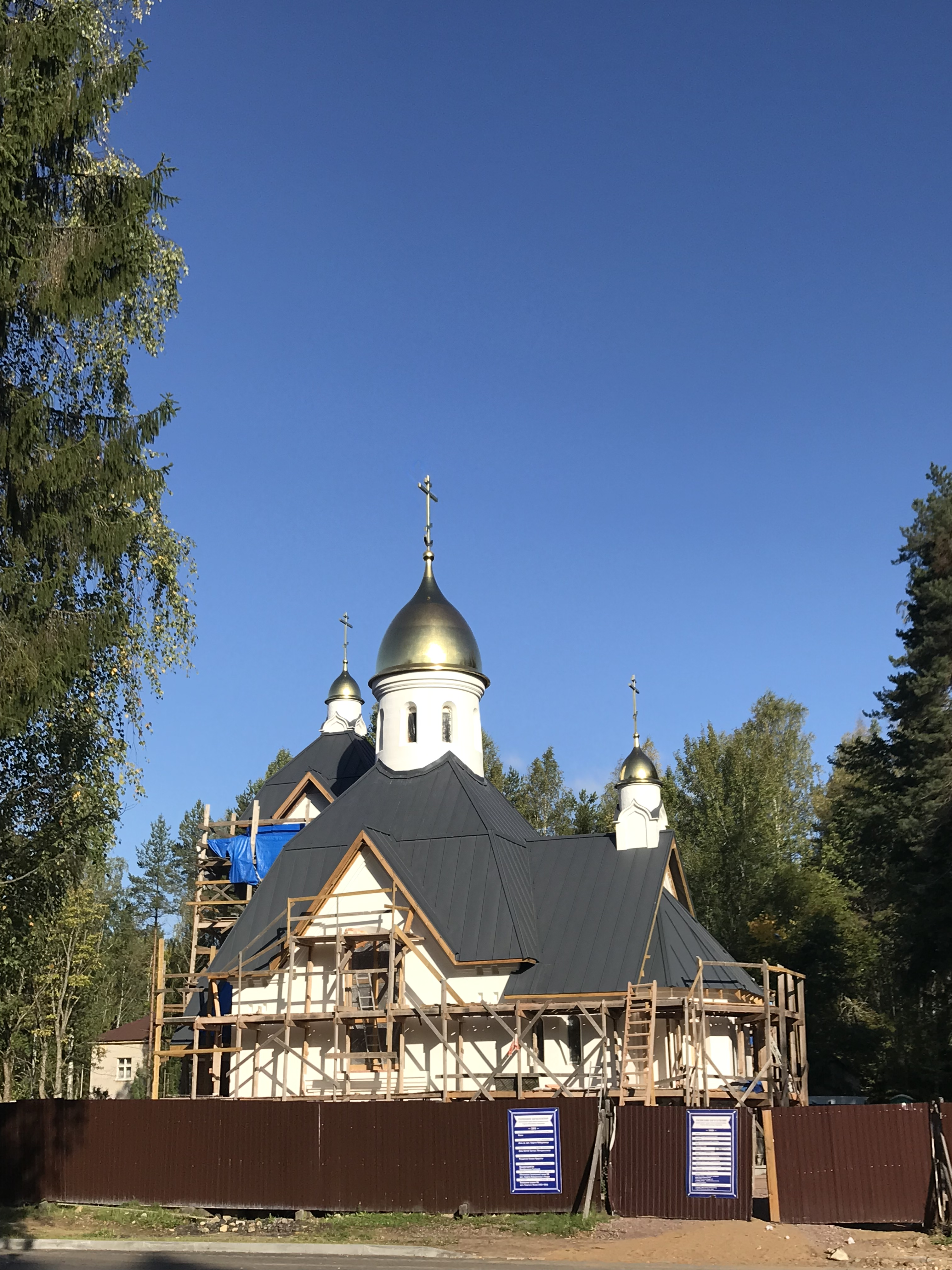 вид строящегося храма Георгия Победоносца в Красавице, 20 сентября 2019г.